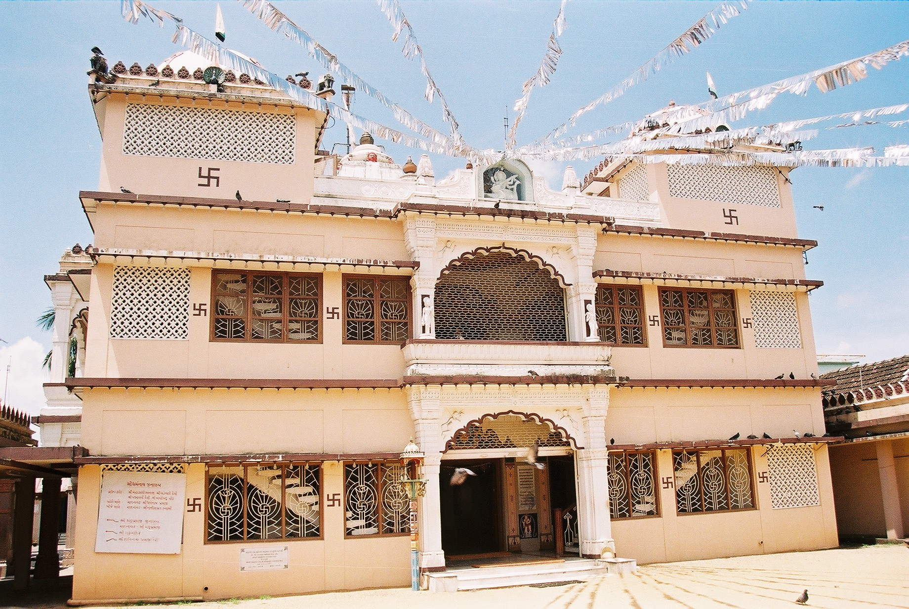 Jain-Tempel in Kochi (Kerala)